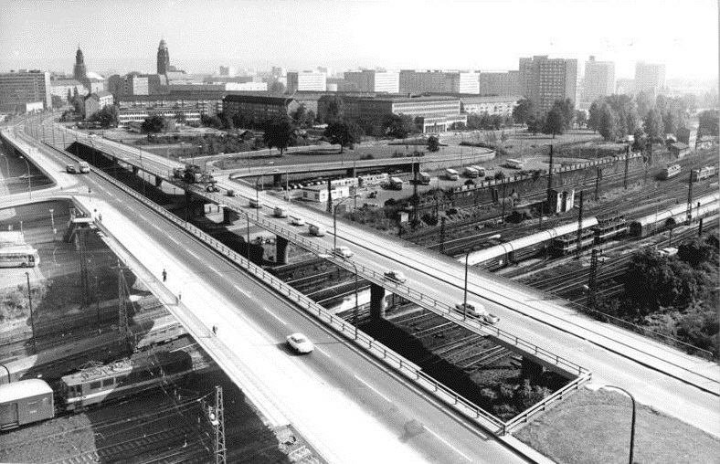 Dresden, Budapester Straße, Hochstraße ADN-ZB Häßler 26.10.77 Dresden: Blick auf die Budapester Straße in Dresden – eine Brückenstraße.